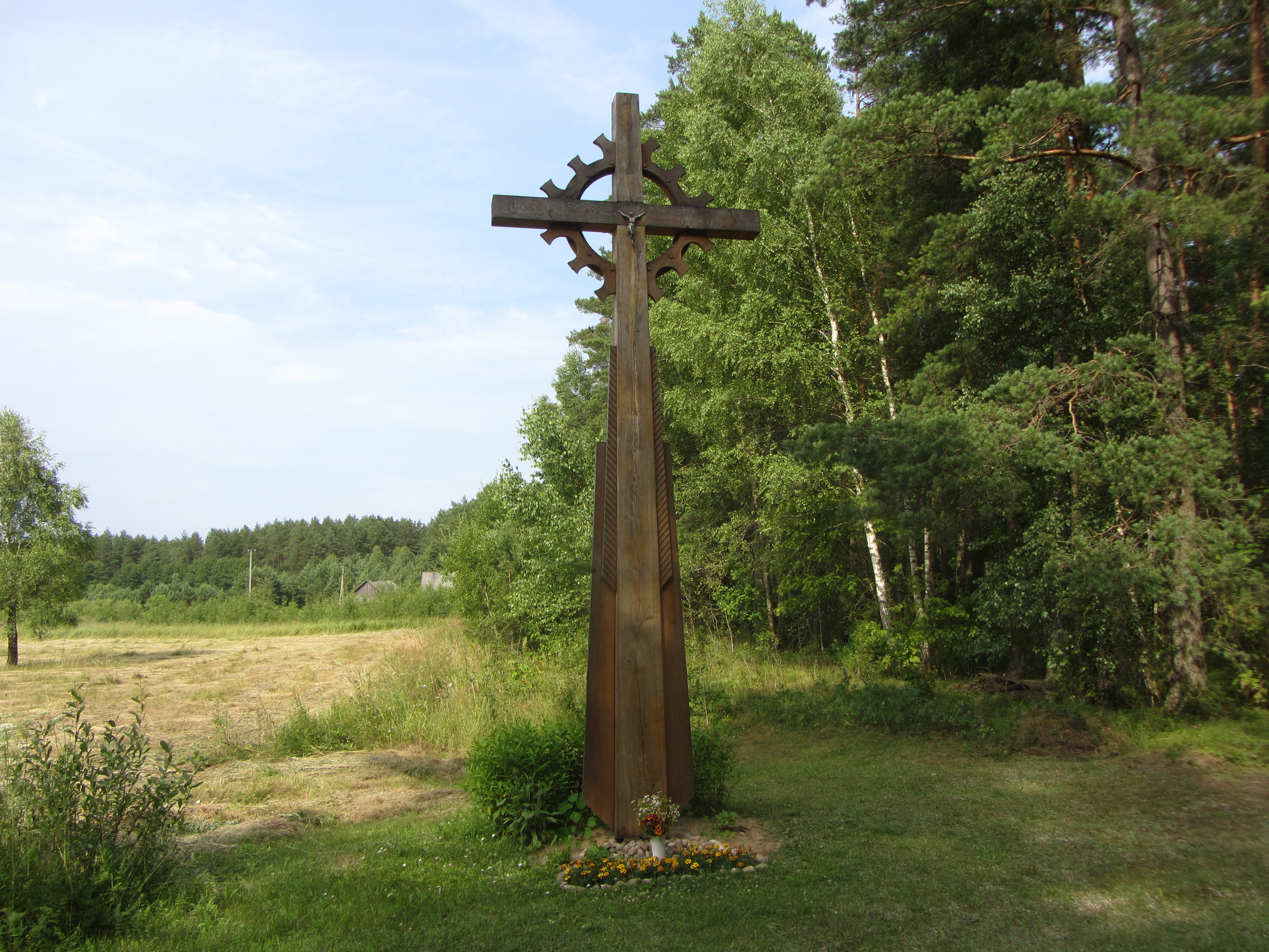 Leipalingio sen., Lithuania